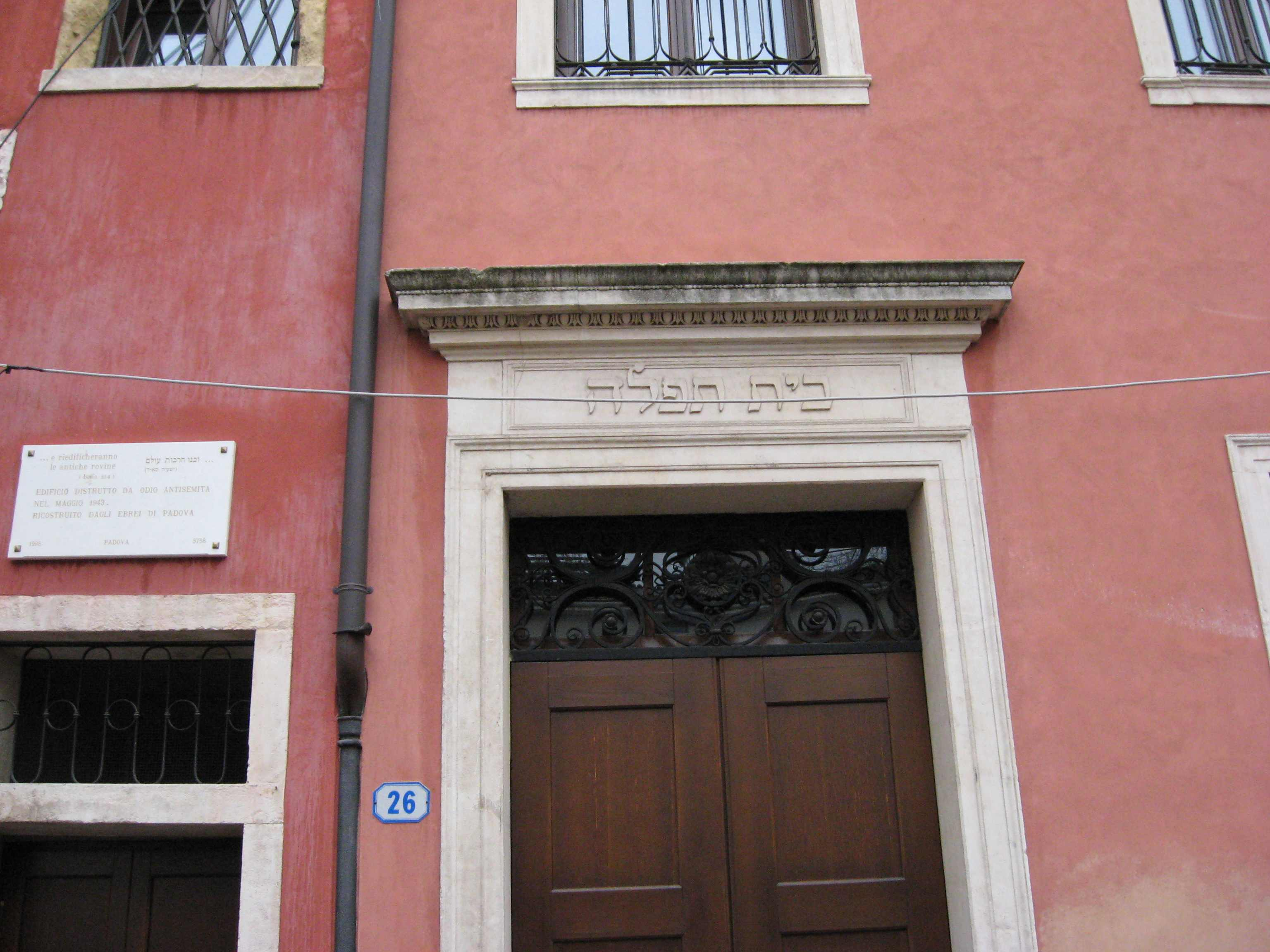 (Aschkenazi) Vecchia sinagoga Padova - (destroyed in 1943 and rebuilt after WW II). No longer a synagogue